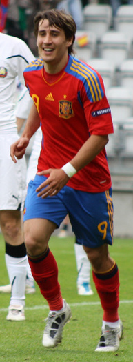 Adrian López and Bojan